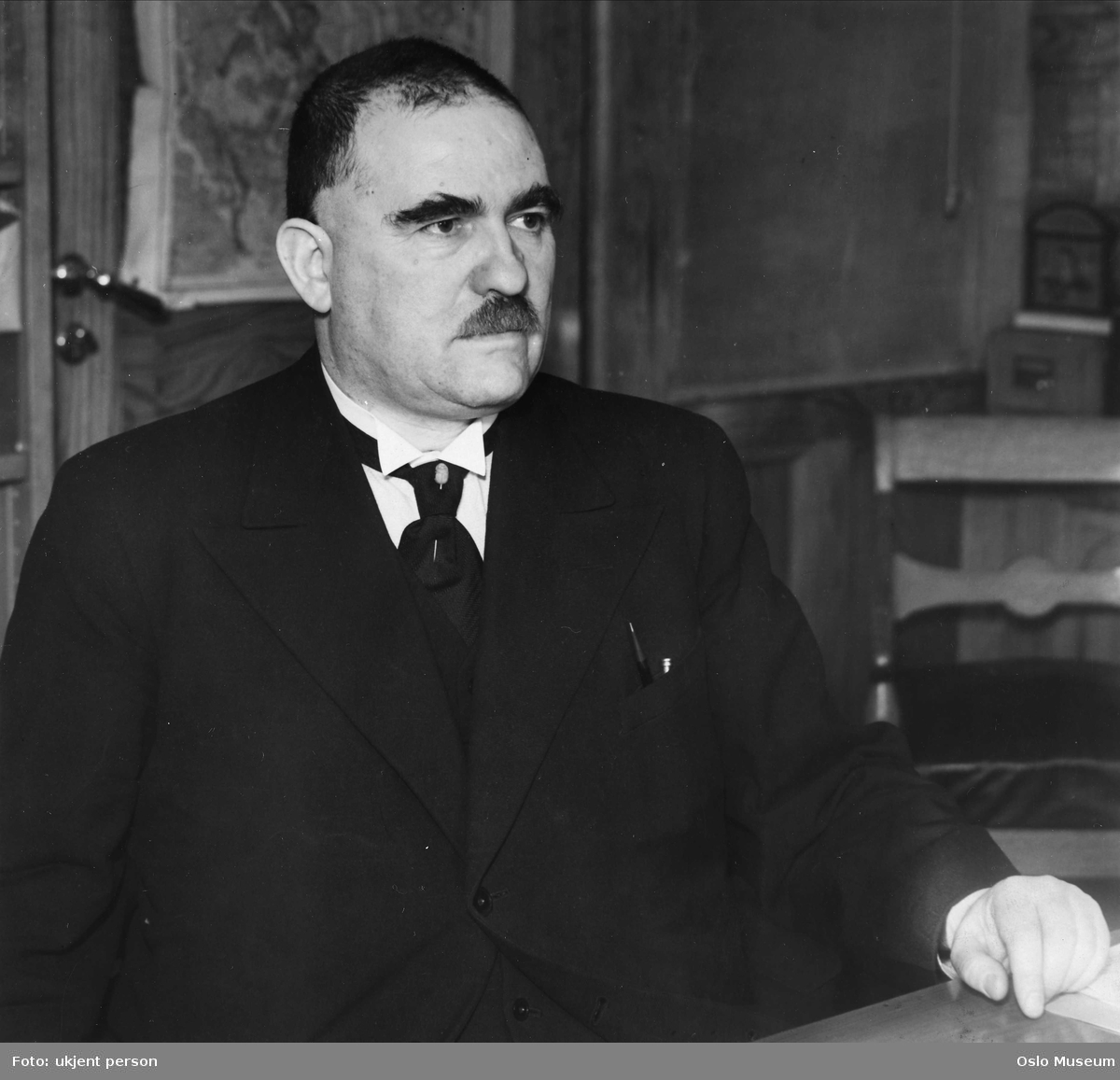 Victor Moritz Goldschmidt ca. 1935